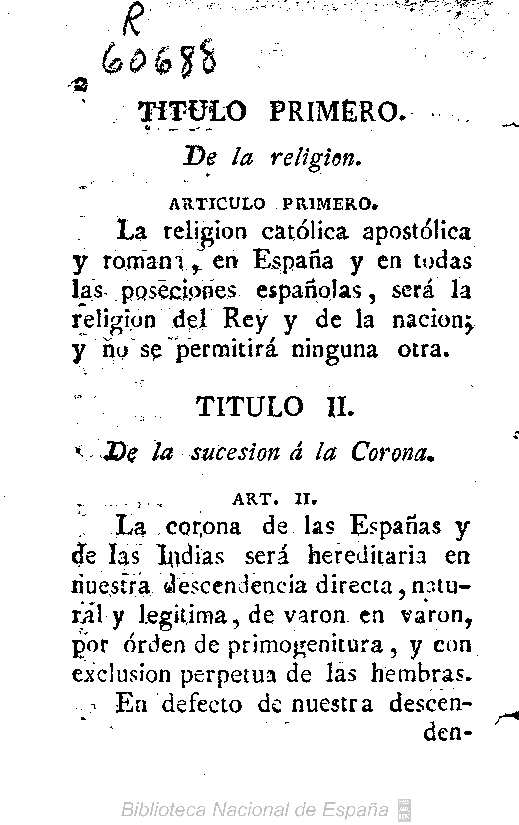 Constitucion : En el nombre de Dios todopoderoso, Don Josef Napoleon, por la gracia de Dios, Rey de las Españas y de sus Indias ...